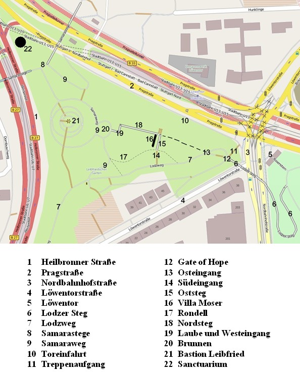 Leibfriedscher Garten, Stuttgart, Lageplan (OpenStreetMap ergänzt).